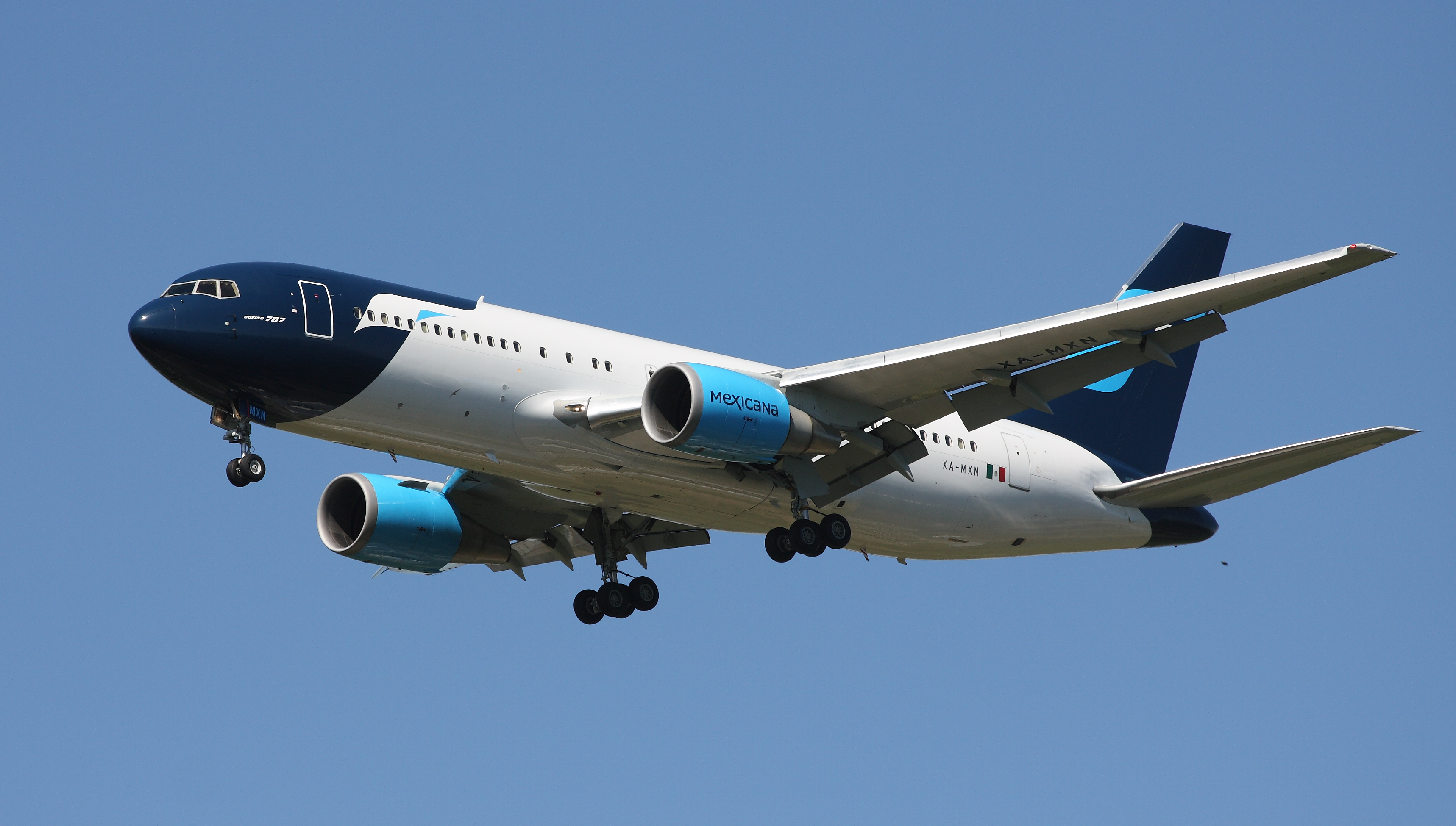 Mexicana B767-25D(ER) XA-MXN MSN24733